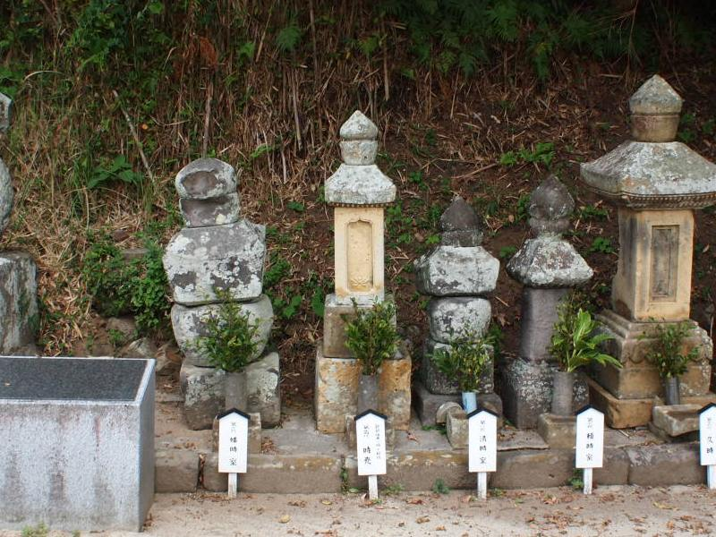 鹿児島県西之表市にある御坊墓地。中央が種子島時尭の墓。